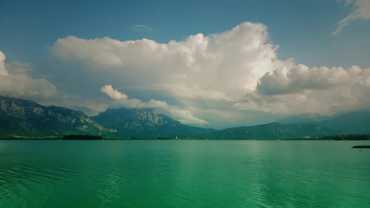 Imposante Färbung des Forggensees